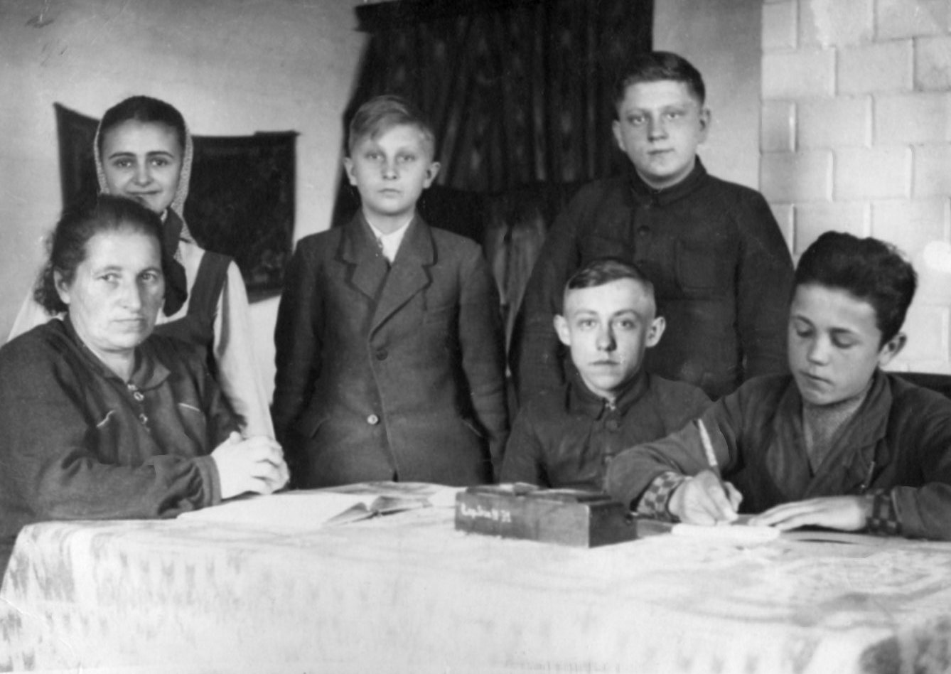 Tajne Komplety. Łopiennik 1941 rok. Ryszard Kurowski podczas lekcji języka polskiego na tajnych kompletach